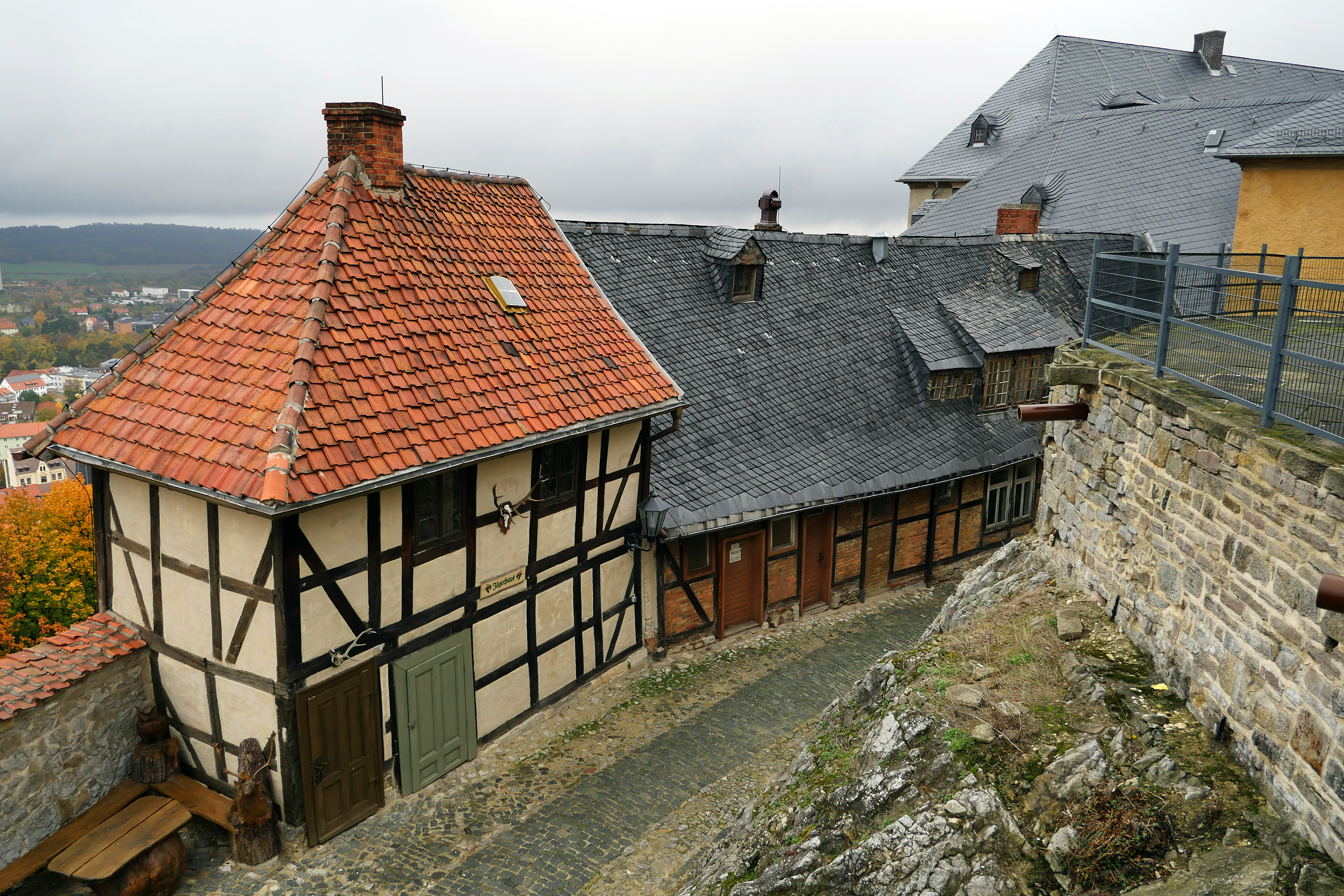 Teil des Großen Schlosses in Blankenburg am Harz